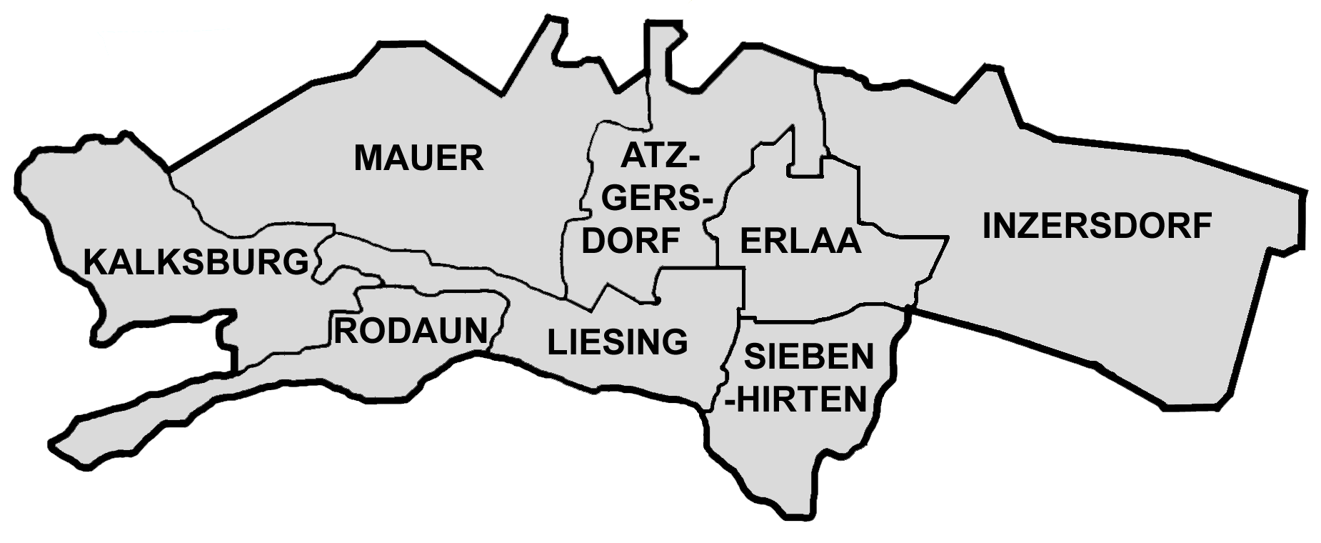 Karte der Bezirksteile des 23. Wiener Gemeindebezirks Liesing